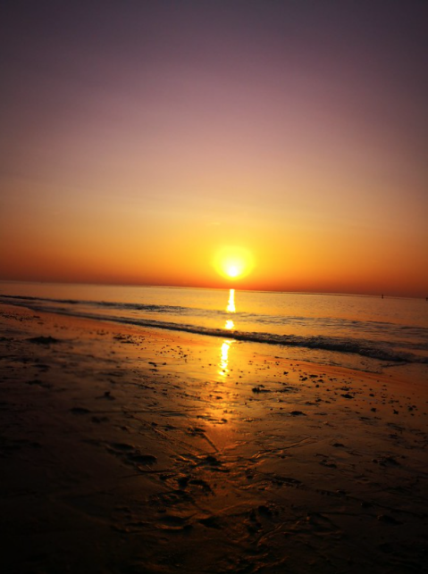 Das Bild zeigt einen Sandstrand in der Abenddämmerung. Es ist in Renesse, Niederland entstanden. Gut zu erkennen sind der Sand, die Sonne und das Meer.